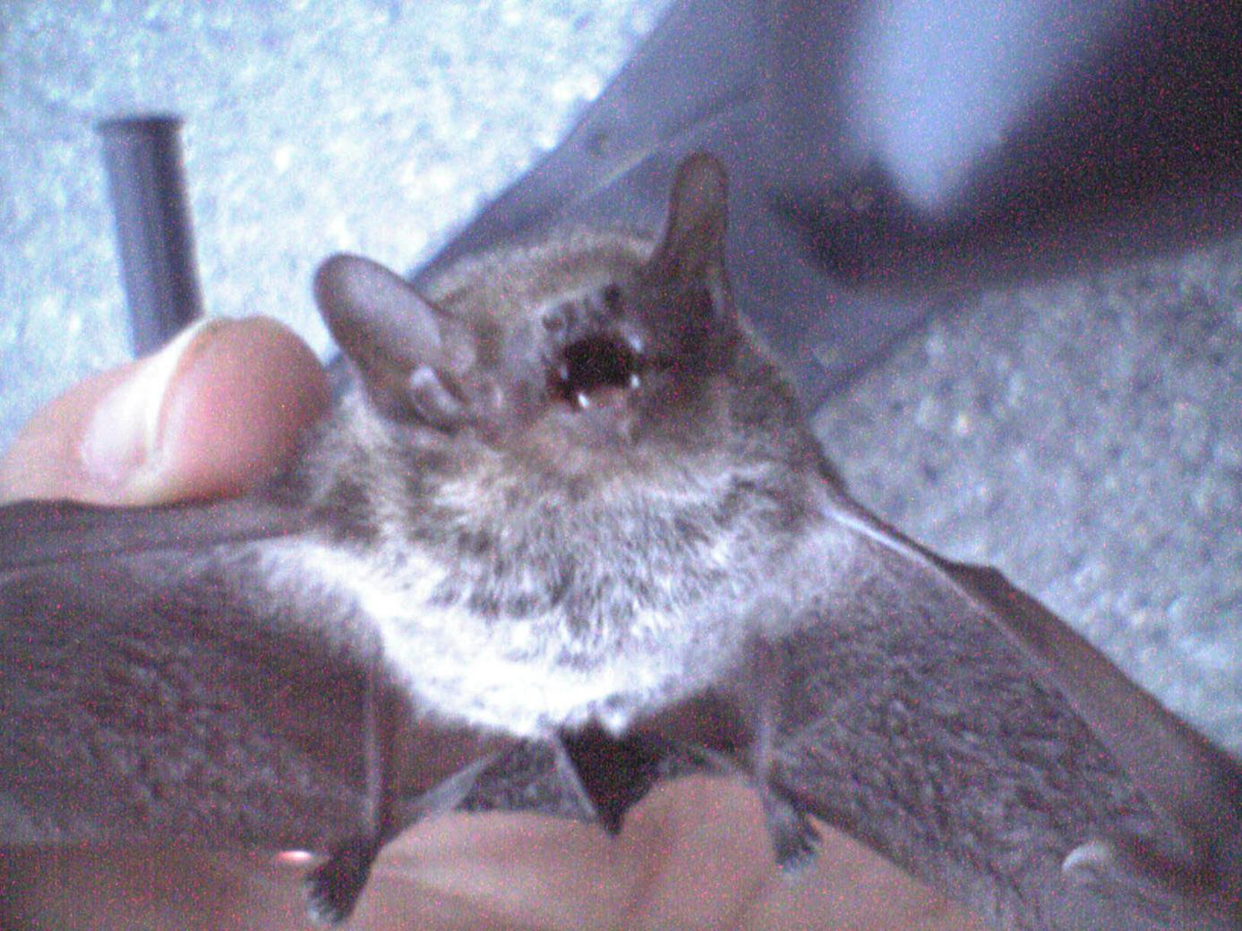 アブラコウモリの顔面。 （オートバイ運転中、メットに激突して即死した直後のアブラコウモリ）